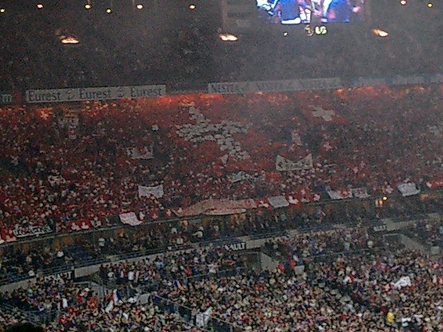 Photo que j'ai prise au Stade de France, lors de la rencontre de football France-Suisse, tribune des supporters de l'équipe de Suisse.